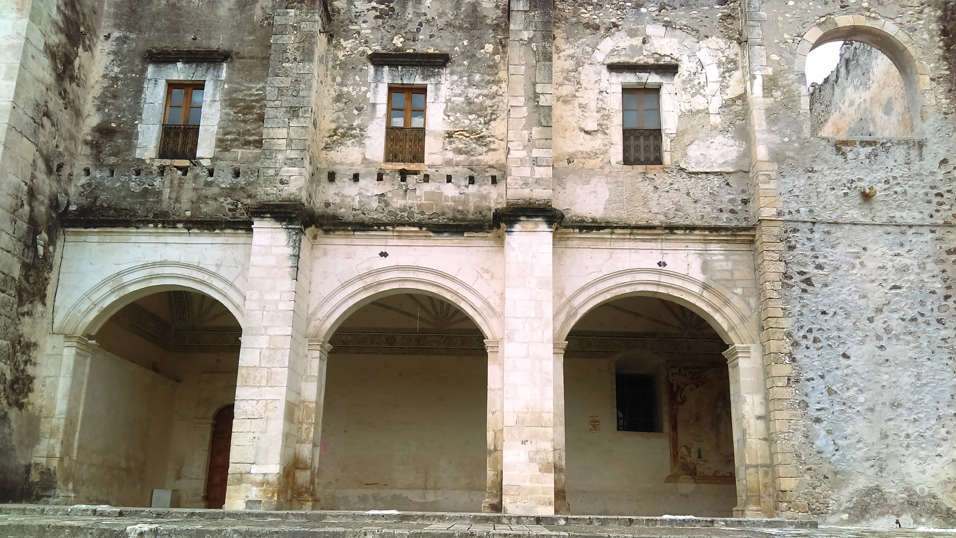 Templo y exconvento de los Santos Reyes, Metztitlán.